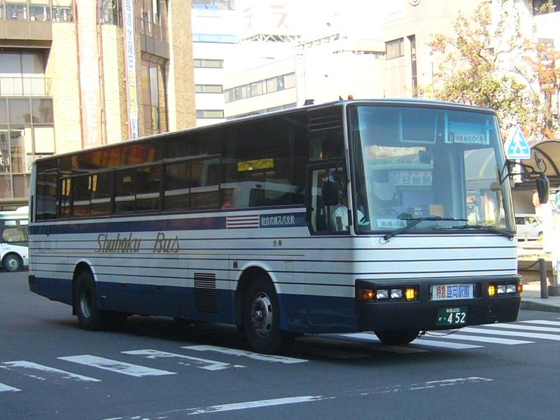 登録番号 秋田200か・452 秋北バス所属 みちのく号用 2006年11月3日 盛岡駅前にて撮影 撮影者 Tokatsu kokubu